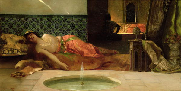 Odalisque